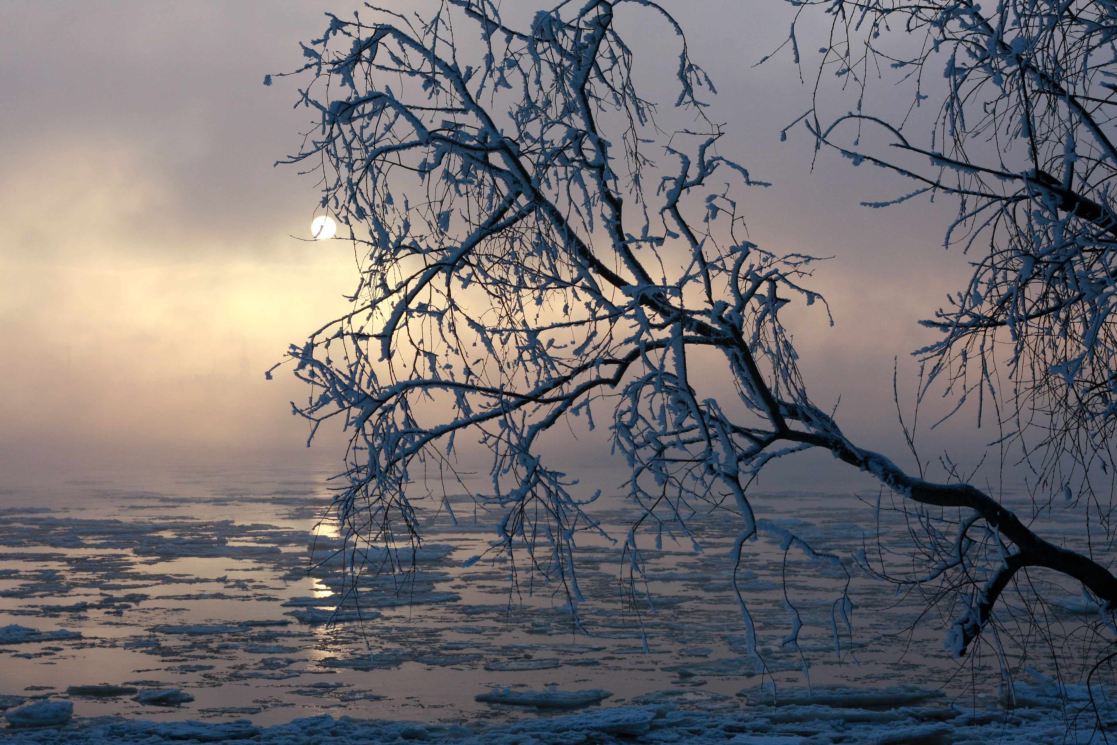 Daugavgrīva, Piejūras dabas parks